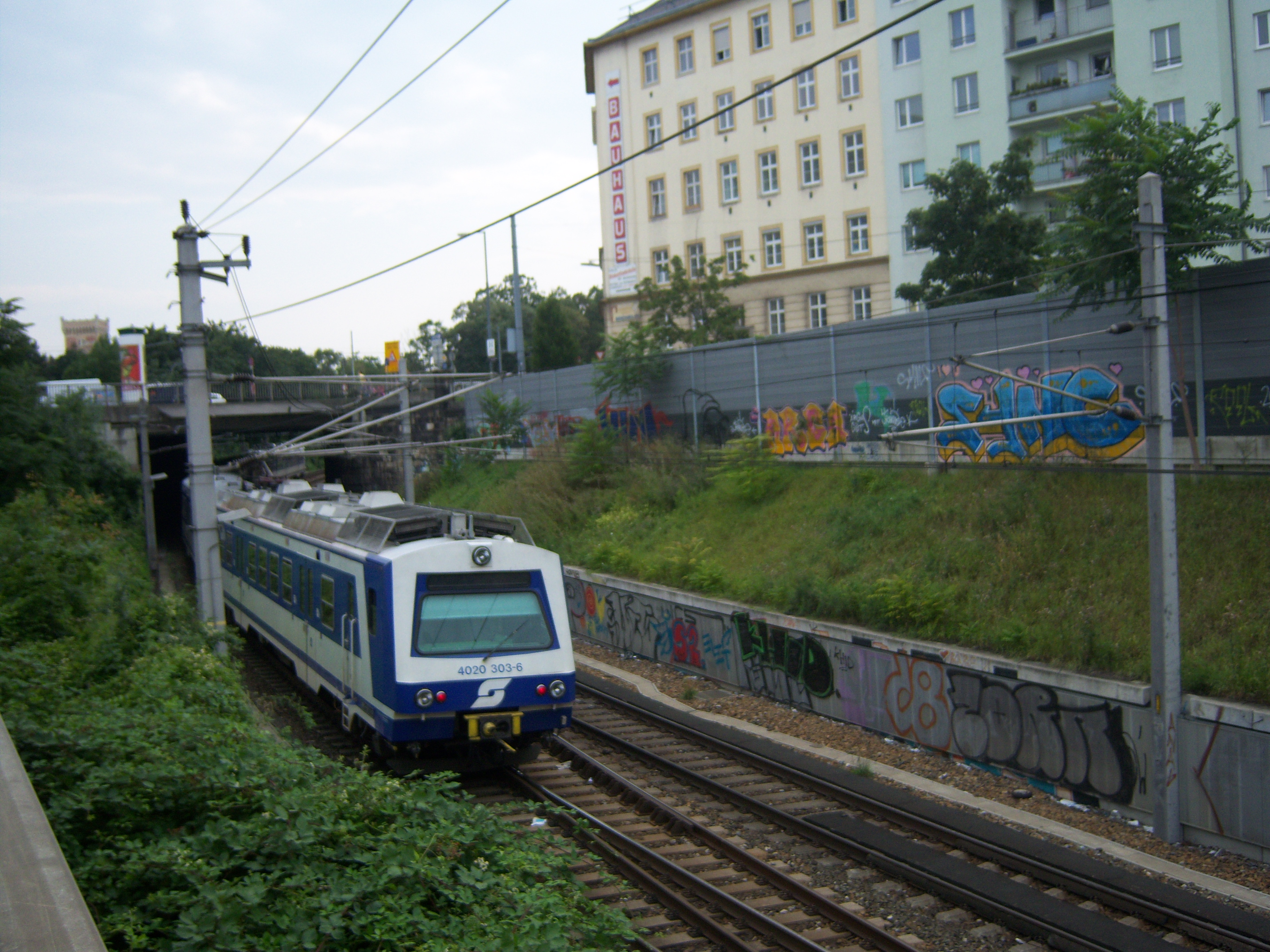 S-Bahn auf der Stammstrecke, kurz vor dem Gürtel, vor dem Südbahnhof